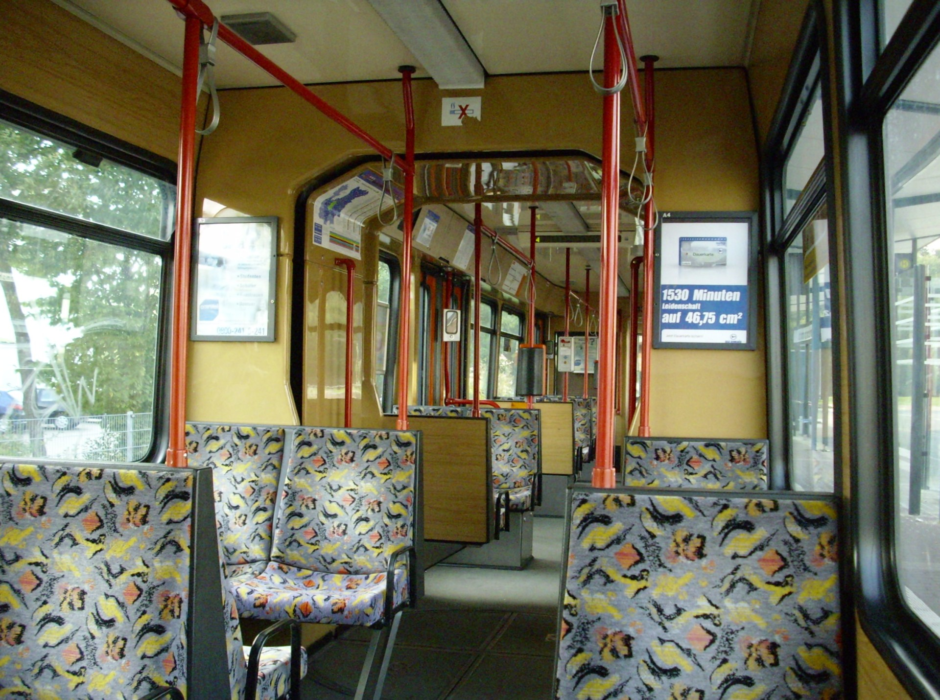 Wnętrze wagonu M8C #543 (Bielefeld, Niemcy).